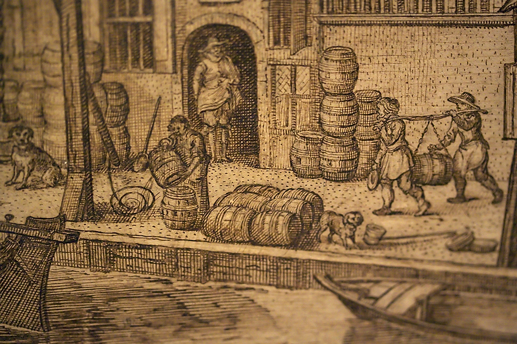 Jacob Matham – Gezicht op de brouwerij De Drie Leliën Jacob Adriaensz Matham, 1627